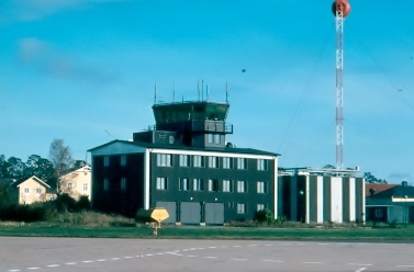 Flygledartornet vid F 6 i Karlsborg.